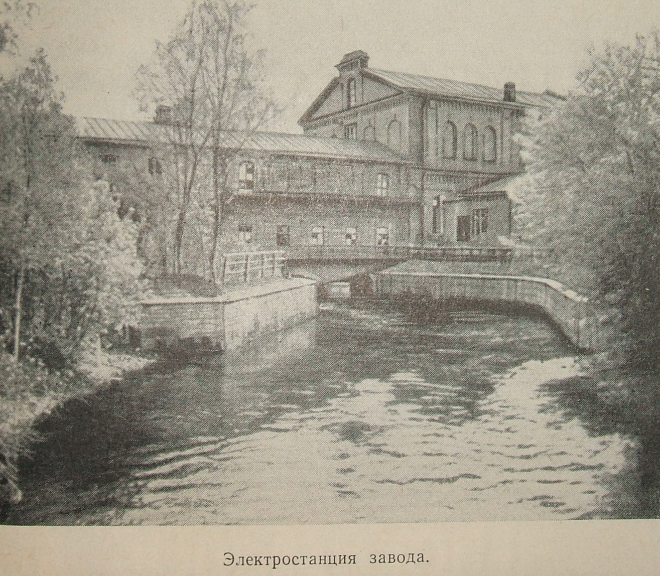 Сестрорецк СПб Оружейный завод Гидроэлектростанция вид со стороны заводскогодвора